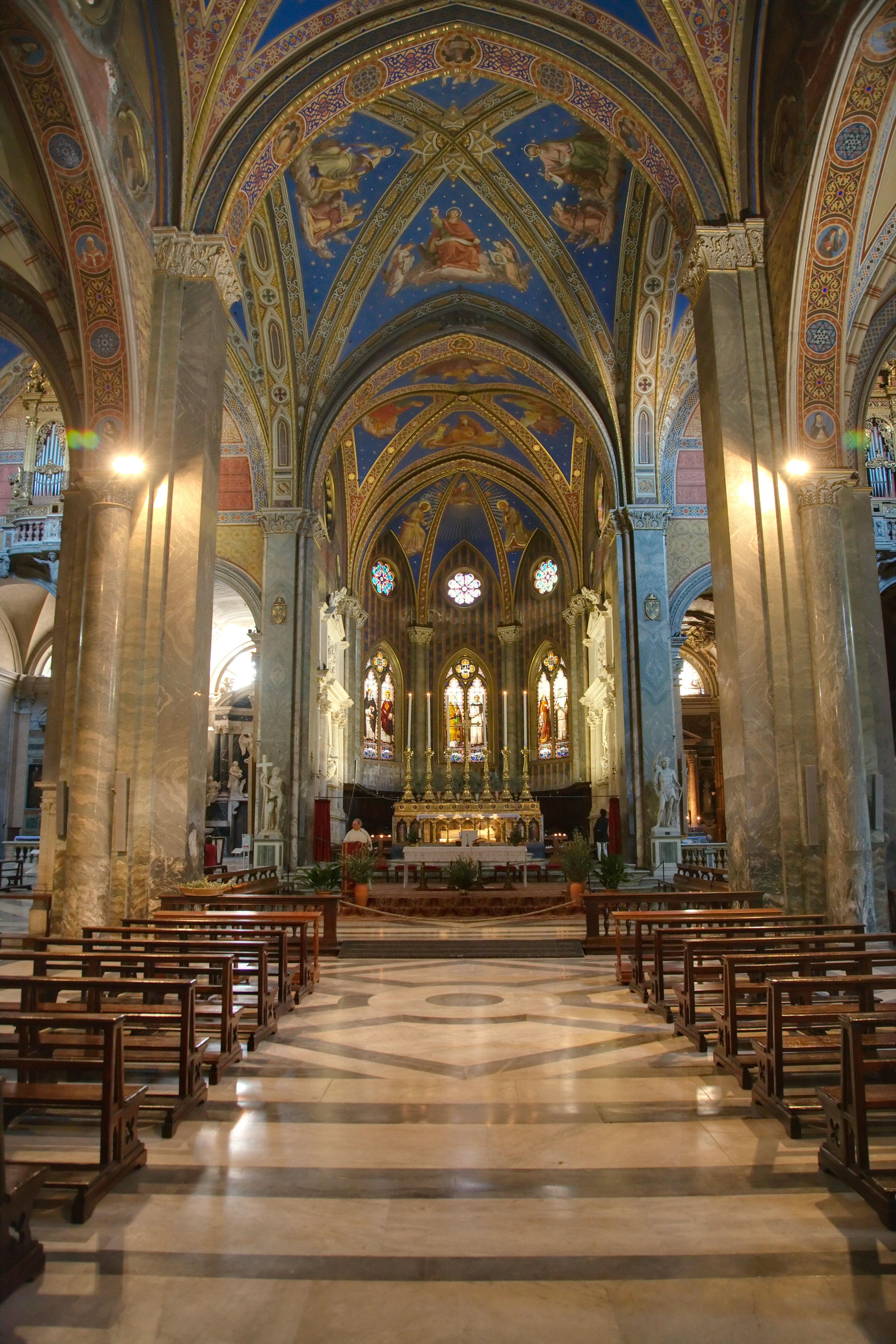 Santa Maria sopra Minerva